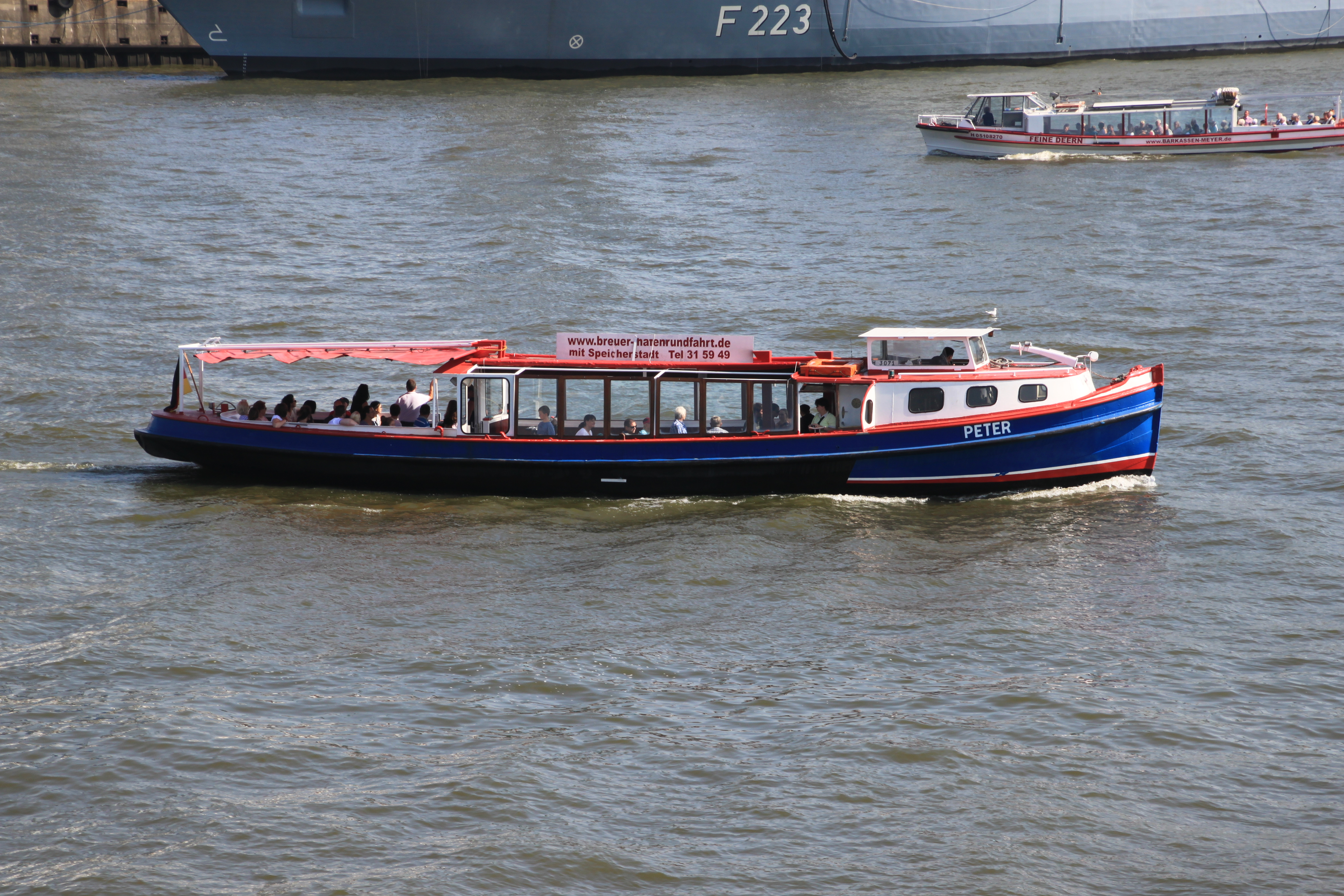 Hafenrundfahrtbarkasse 'PETER' im Kuhwerder Hafen